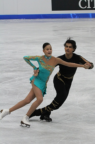 Карина Узурова и Иляс Али (Казахстан) на чемпионате мира по фигурному катанию среди юниоров 2012